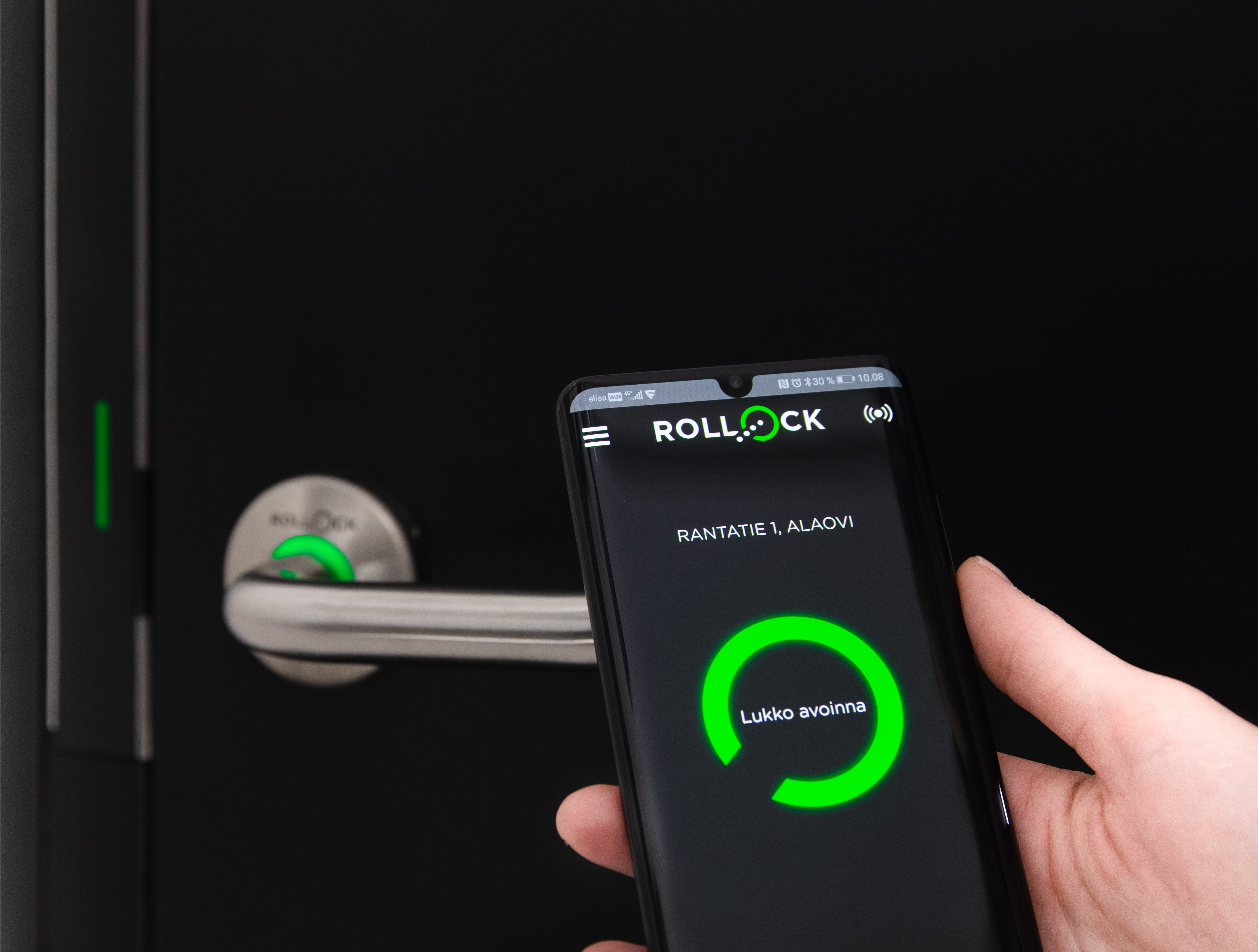 Rollock älylukon voi etäavata mobiilisovelluksella.